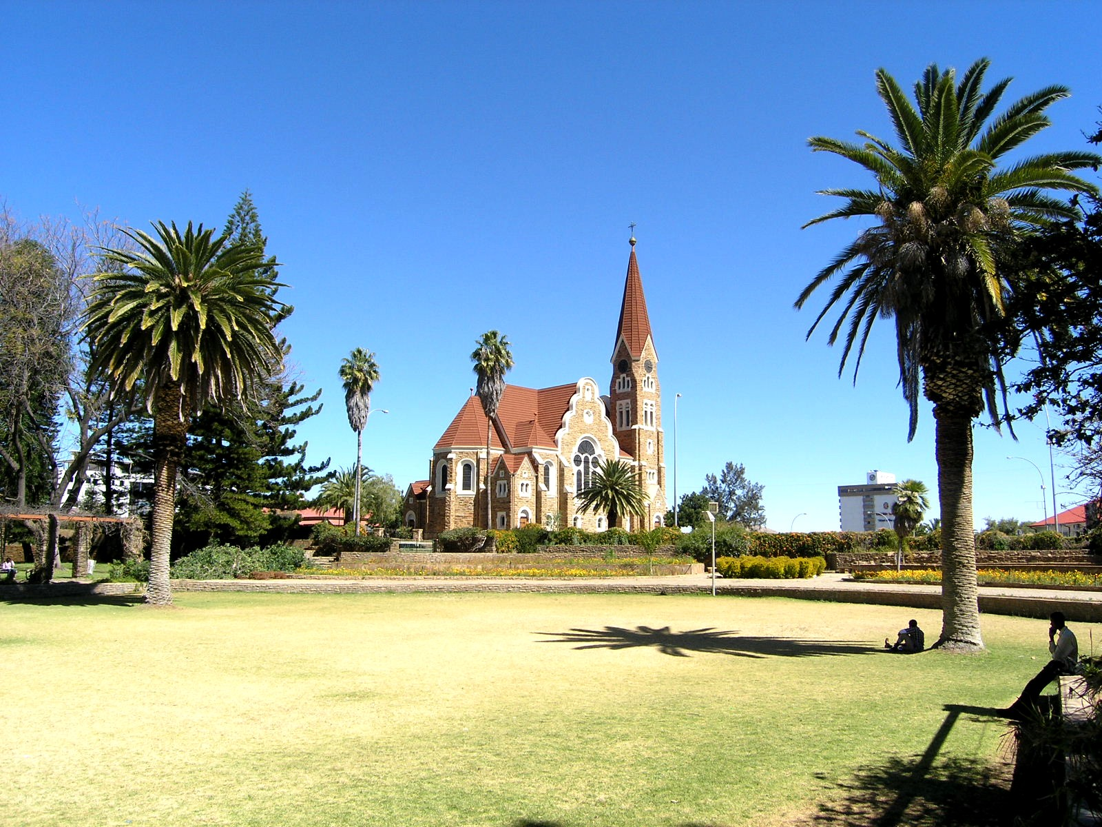 Parlamentsgärten und Christuskirche